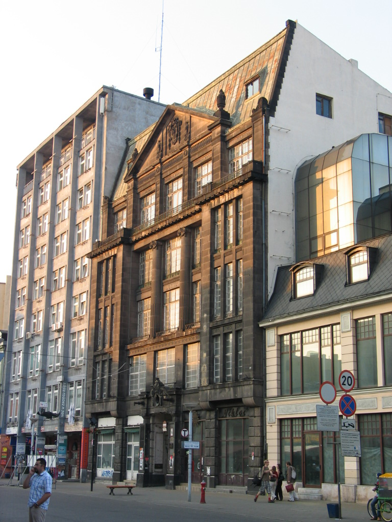 Dawny biurowiec Siemensa w Łodzi